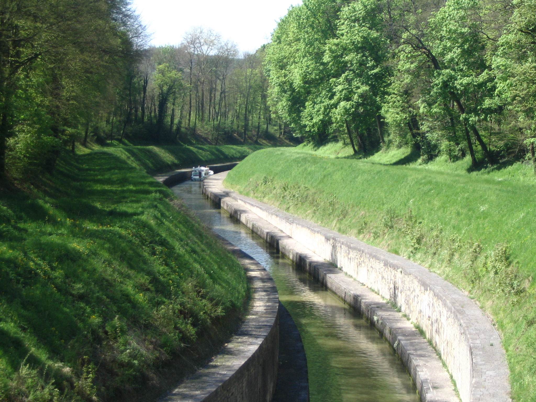 Tunnel de St Albi côté Ovanches